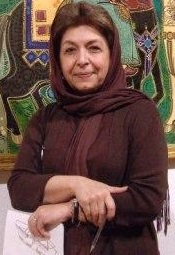 yek khanome mehraban vali besyar jedi!